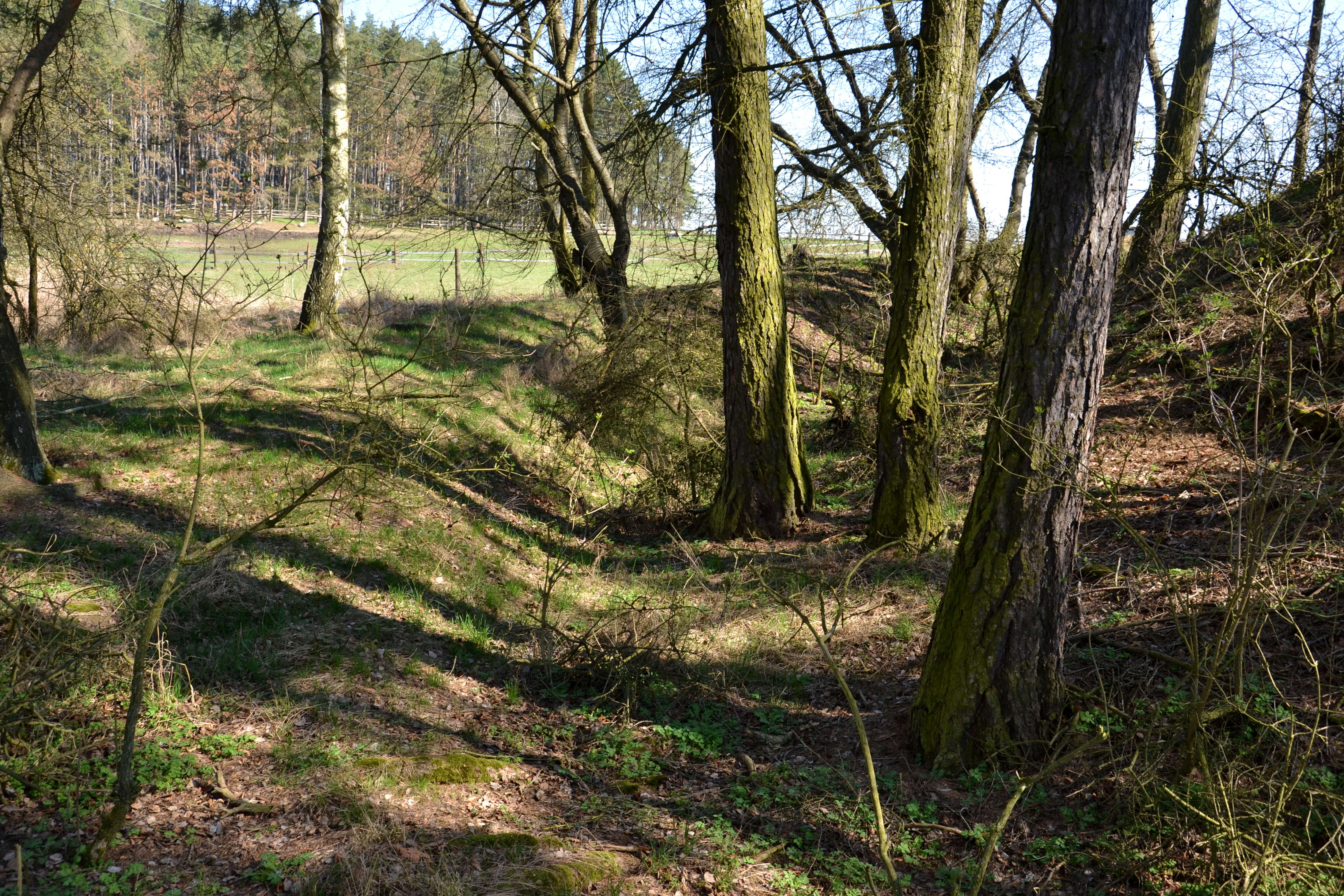 Tvrziště Hluboký – příkop a val na severní straně